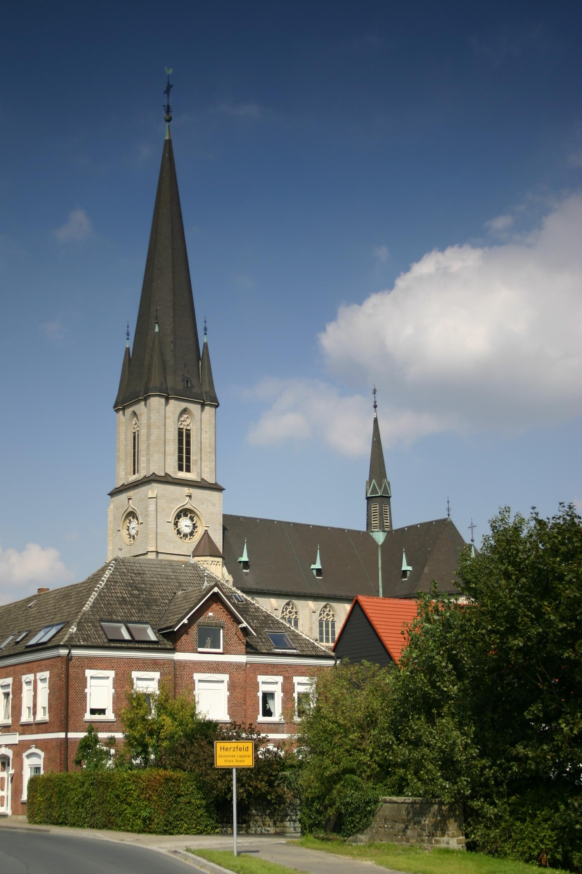 Die ab 1900 errichtet St.-Ida-Kirche in Herzfeld (Lippetal)